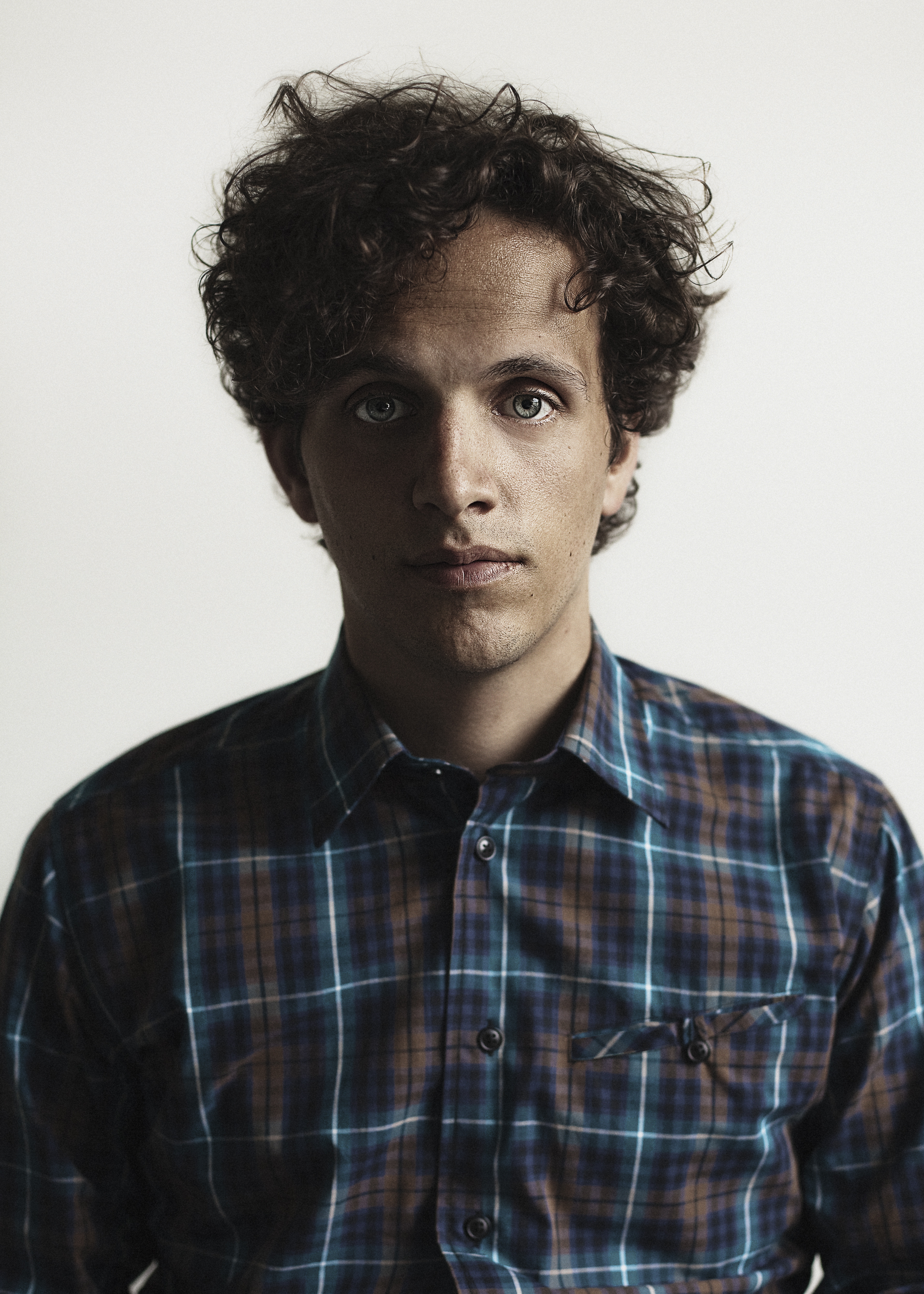 Artisten Salem Al-Fakir.